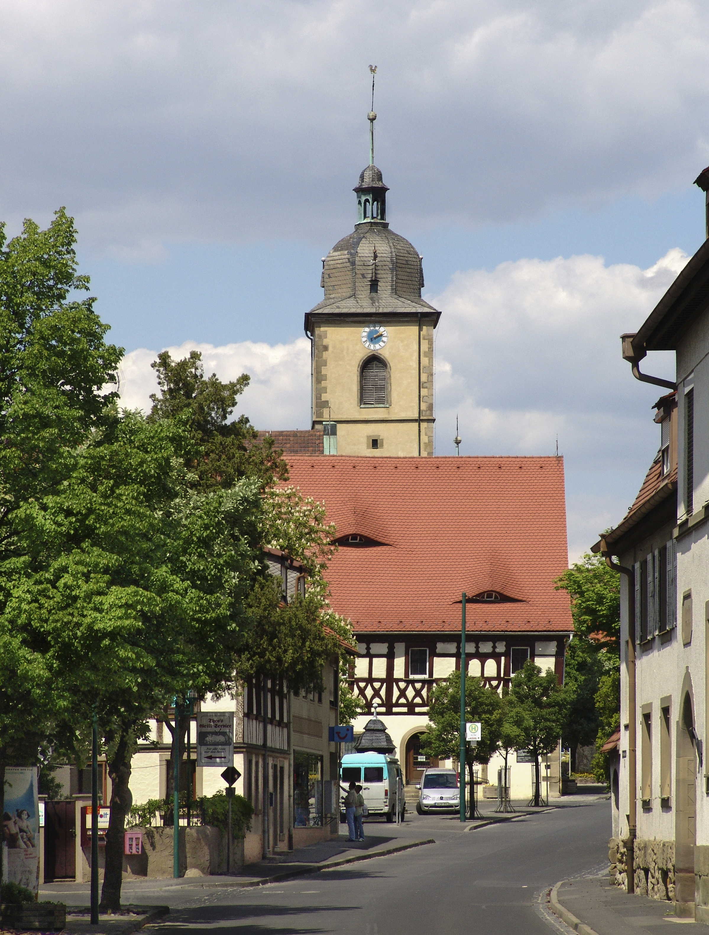 Gochsheim-Am Plan